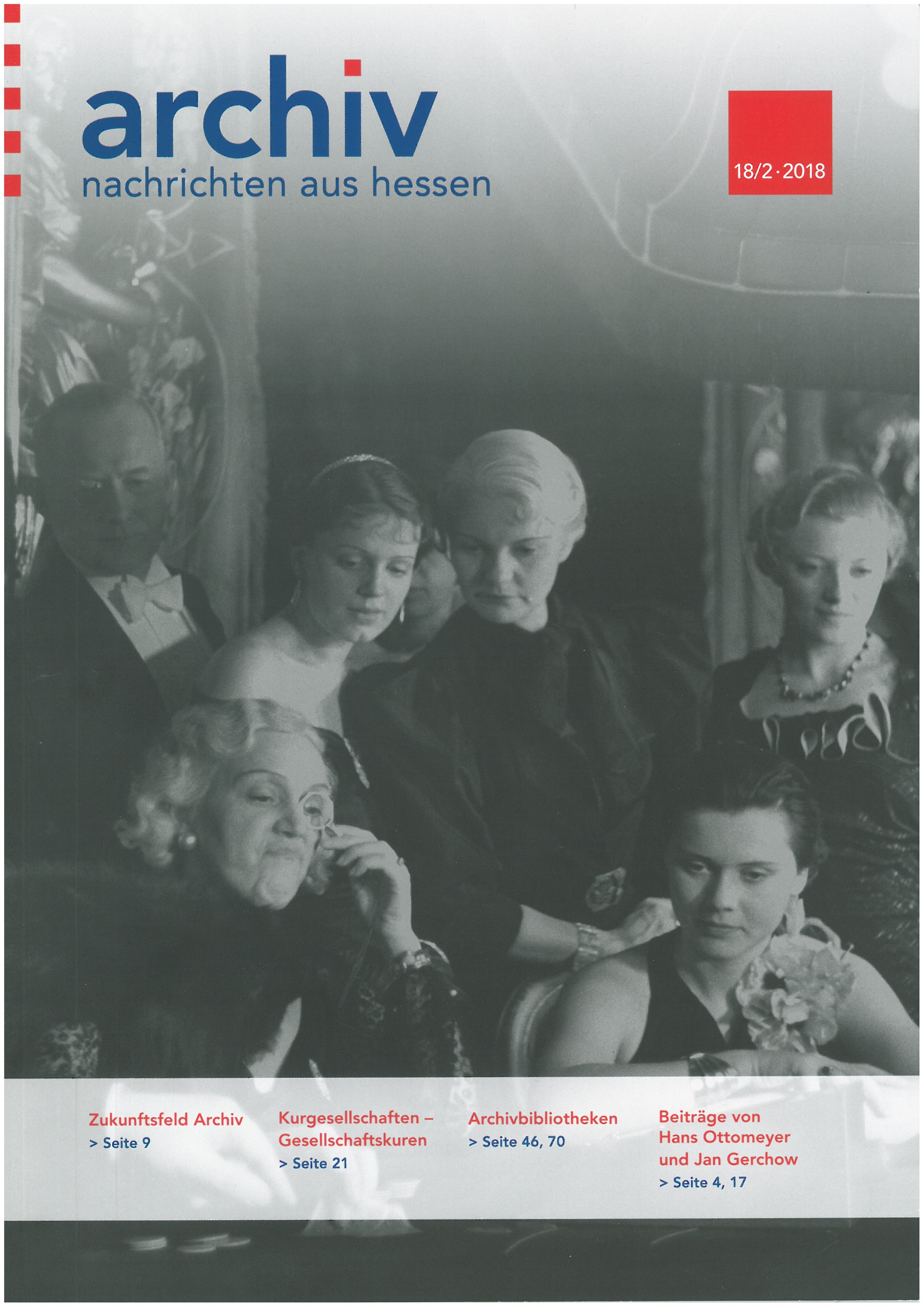 Titelblatt der Archivnachrichten aus Hessen